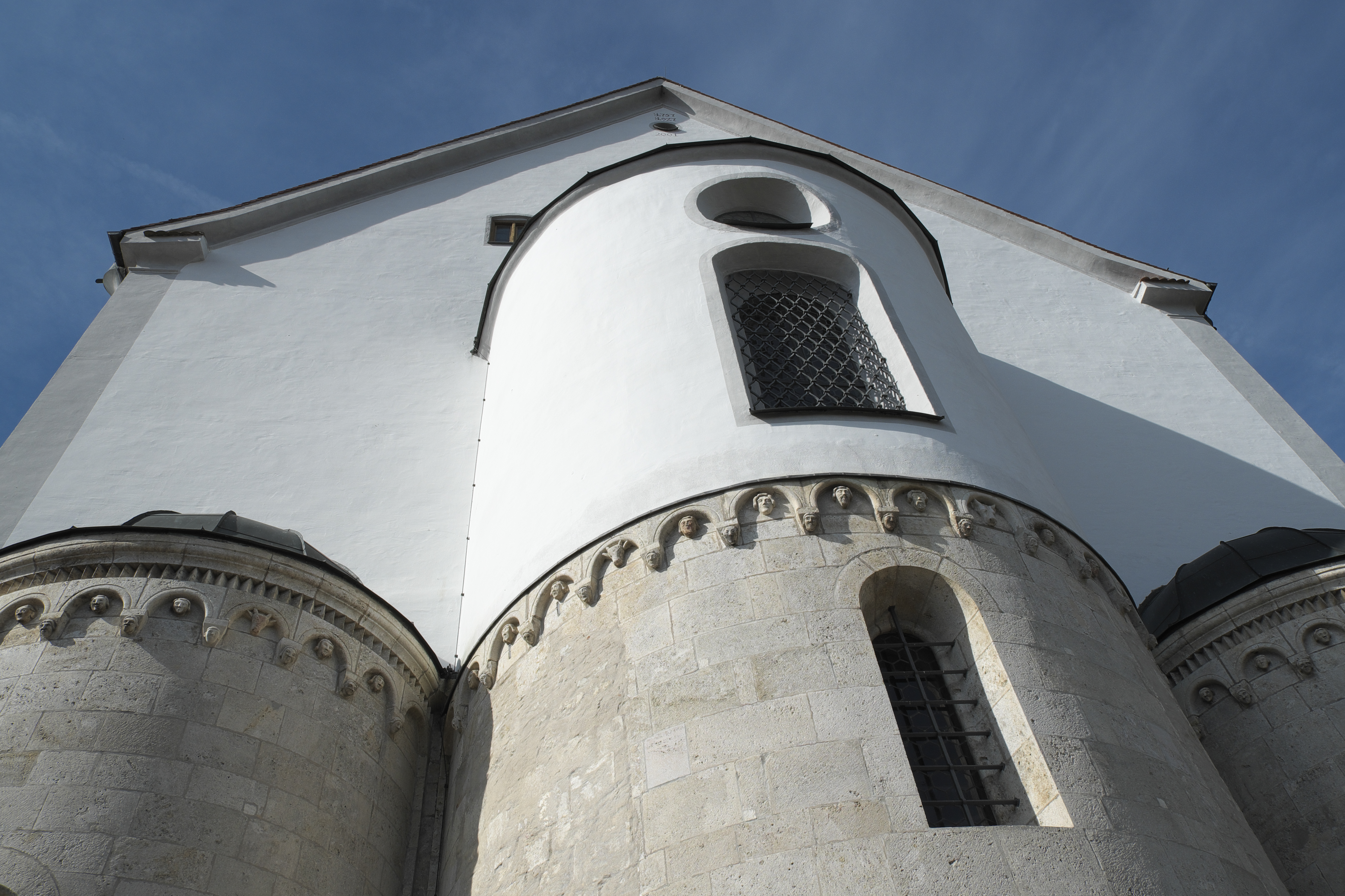 Wallfahrtskirche Heilig Kreuz, ehemalige Benediktinerinnenklosterkirche des Klosters Bergen in Bergen, einem Ortsteil von Neuburg an der Donau im Landkreis Neuburg-Schrobenhausen (Oberbayern/Bayern), Chorapsiden mit Bogenfries und Kopfkonsolen